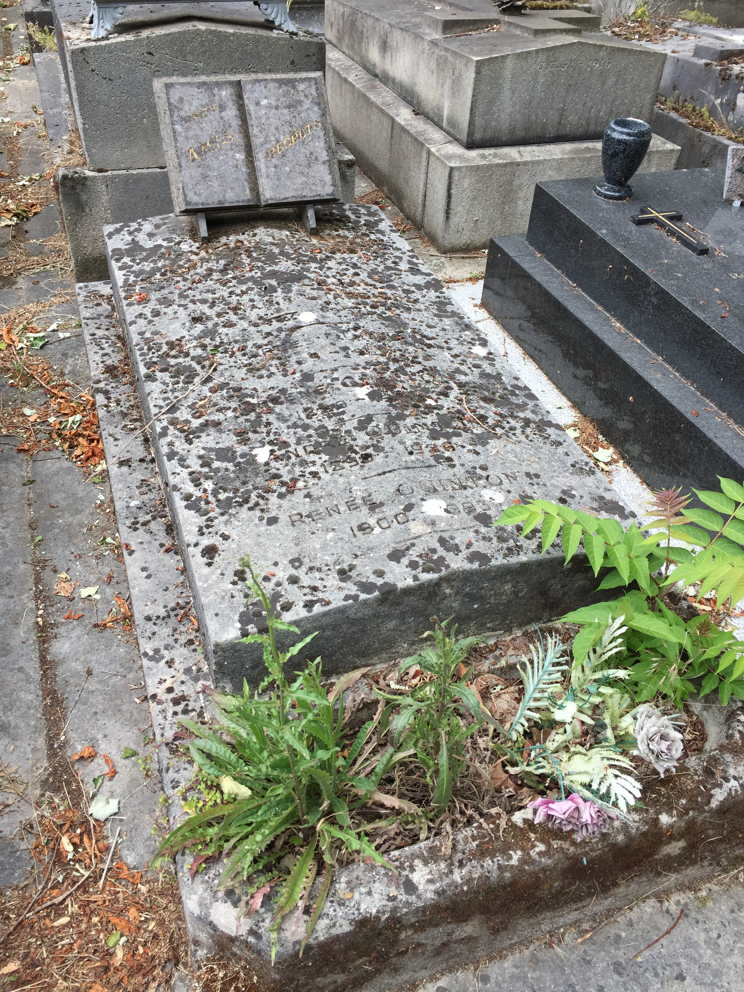 Sépulture de Victor Lejal au cimetière parisien de Saint-Ouen